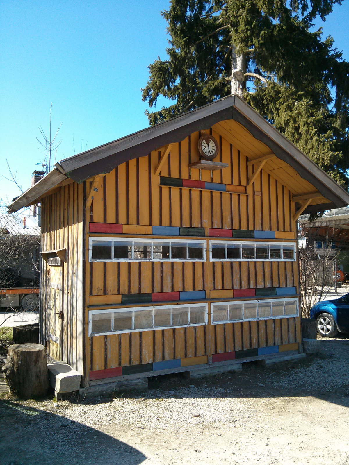 ErLiBi, Erstes literarisches Bienenhaus in Illertissen